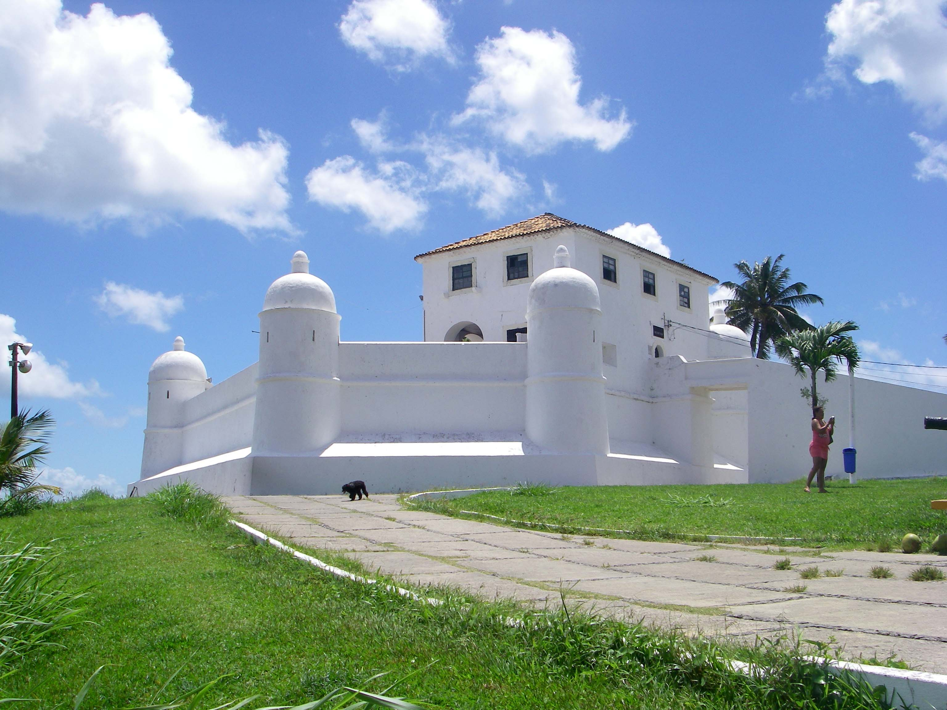 Monte Serrate Fortress in Salvador, Bahia, Brazil